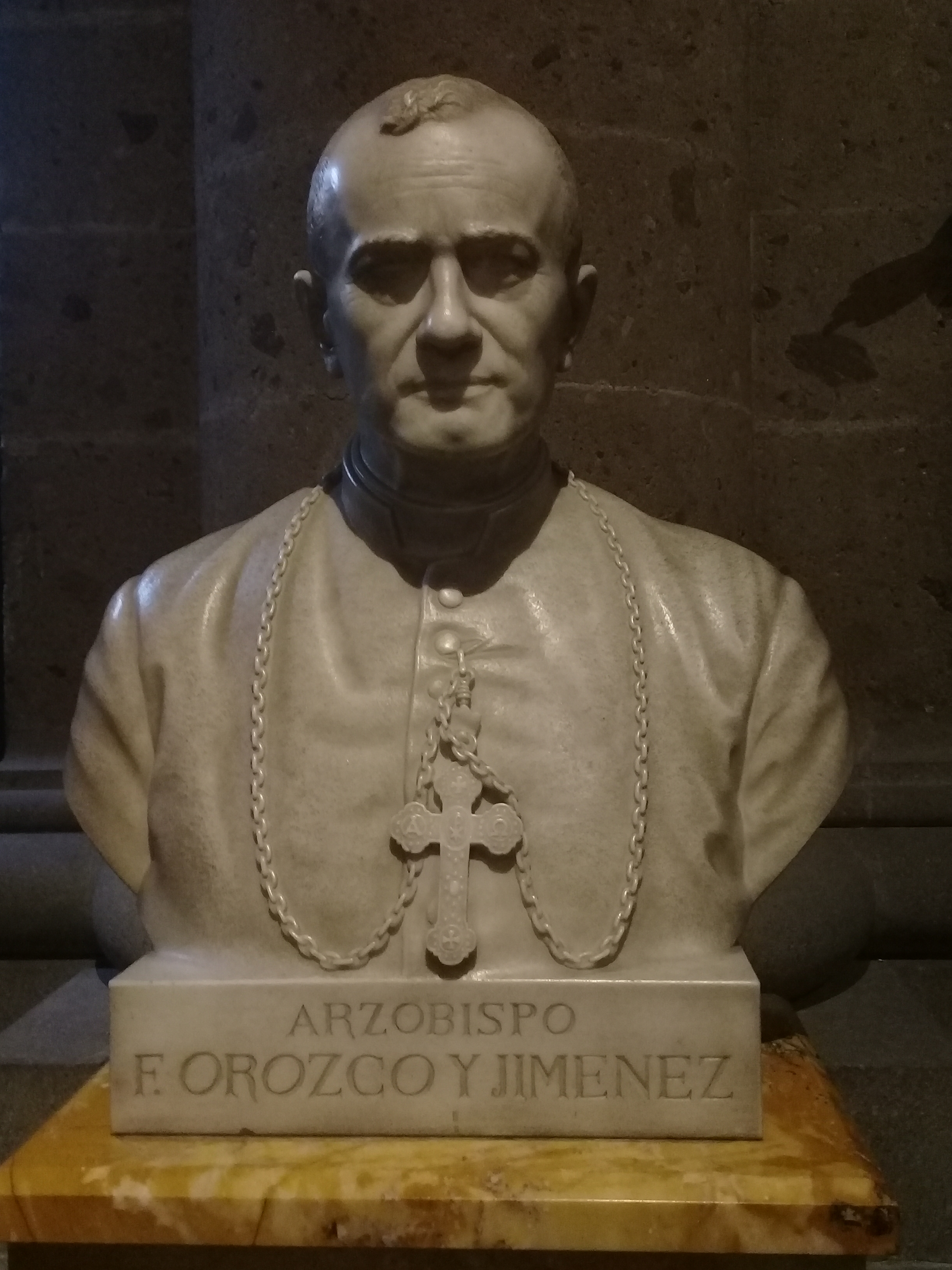 Busto de Mons. Francisco Orozco y Jiménez, Arzobispo de Guadalajara